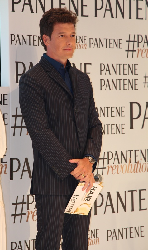 Rodrigo Faro-002